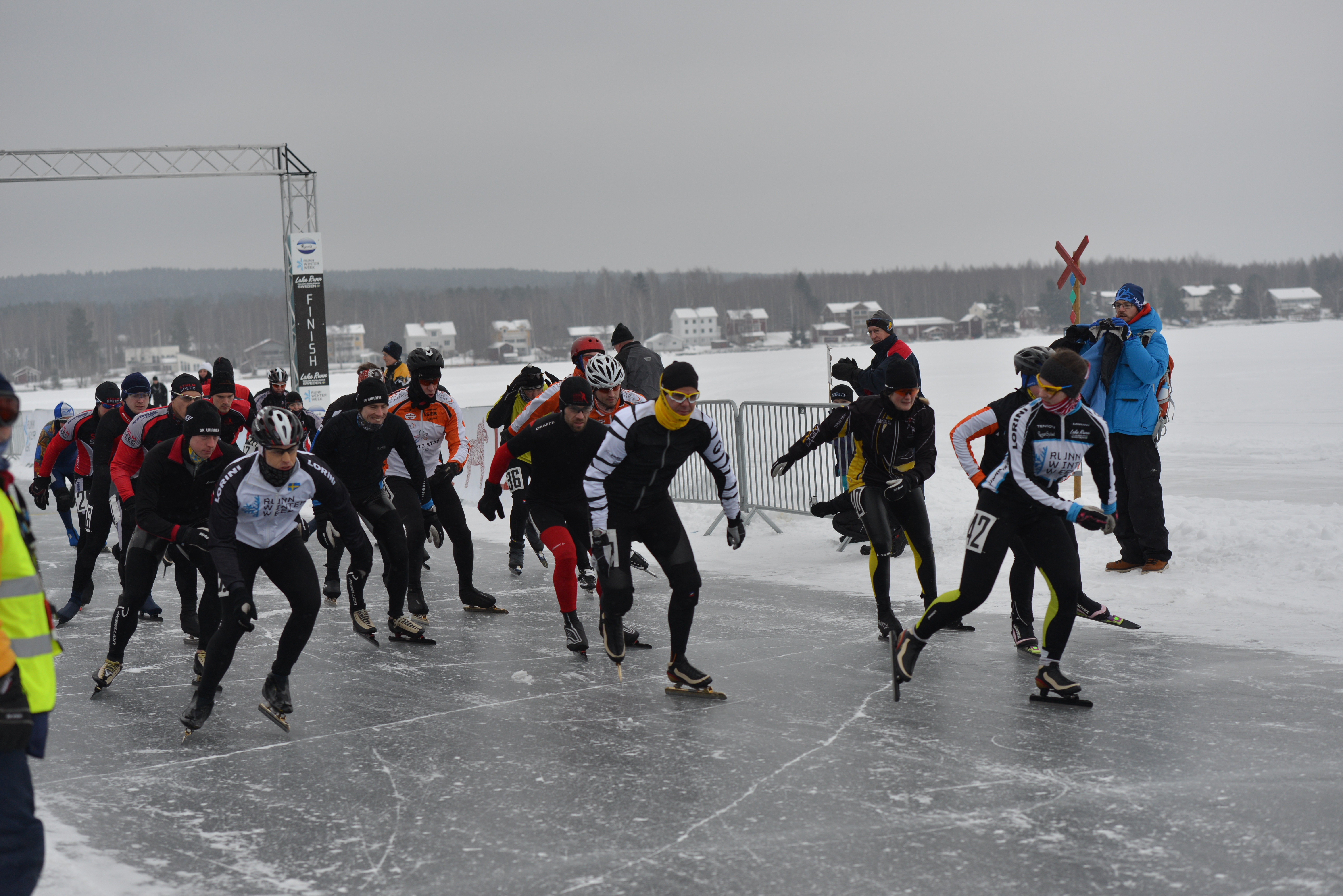 SM hastighetsåkning på skridskor, maraton på sjön Runn. Peter Resar vann herrklassen före Matt X. Richardson och David Hjalmarsson. Eva Lagrange vann damklassen före Anna Hånell och Lina Börjes.